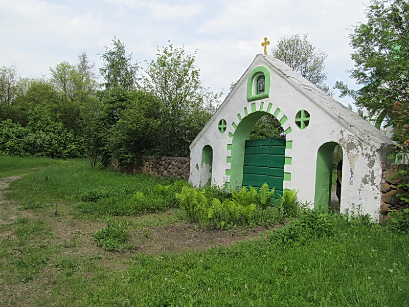 Мізгіры. Царква Святых Пятра і Паўла